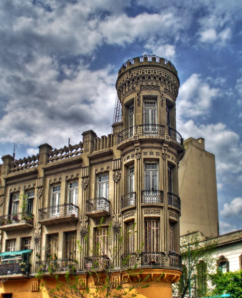 Wenceslao Villafañe 385 (esquina con Perez Galdos), La Boca, Buenos Aires, Argentina.